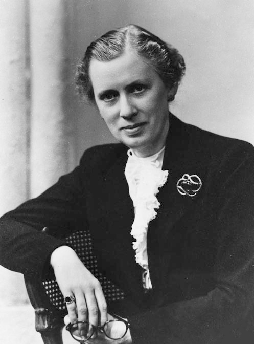 Margaret Fairlie (1891–1963)